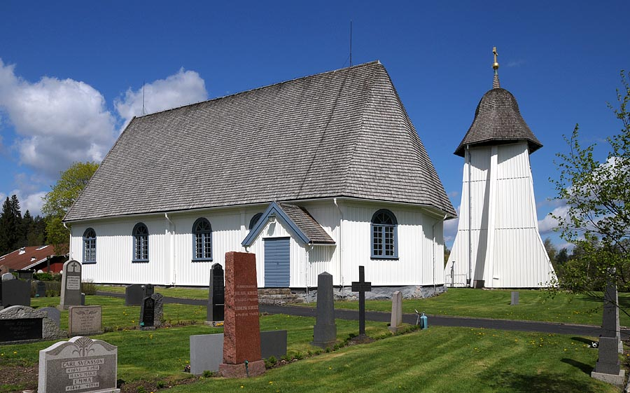 Norra Unnaryds kyrka. Bild tagen av Åke Johansson